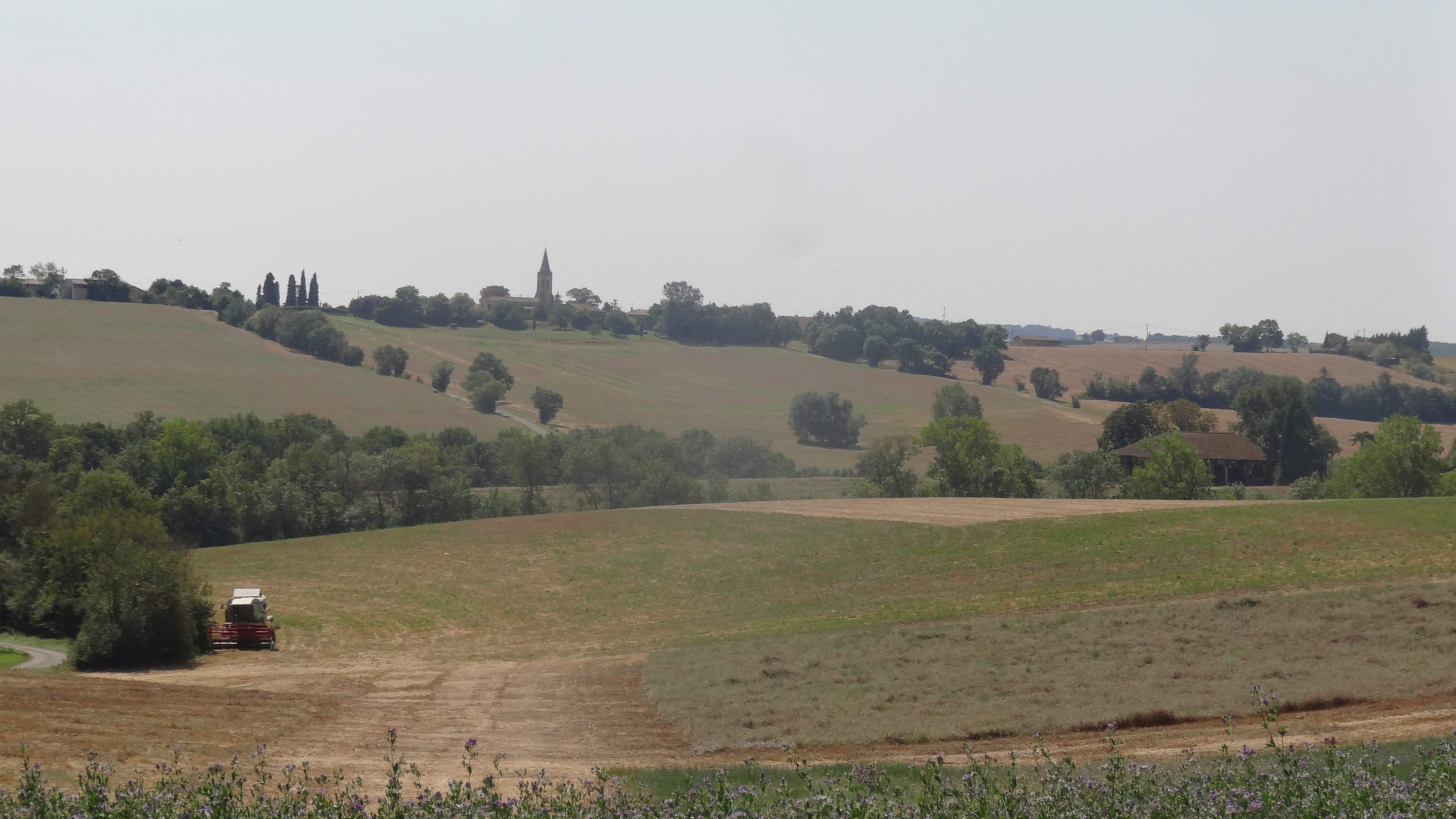 Le village d'Ansan dans le Gers vu depuis le hameau de Lucvielle.